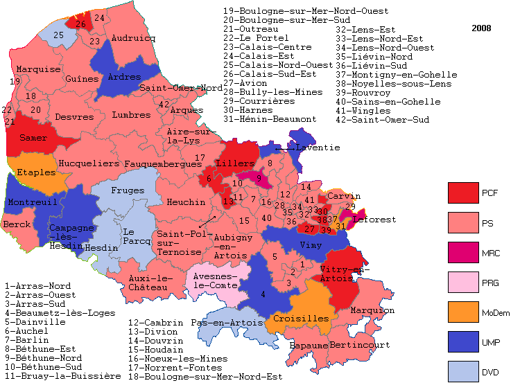 Couleur politique des cantons du Pas-de-Calais en 2008.